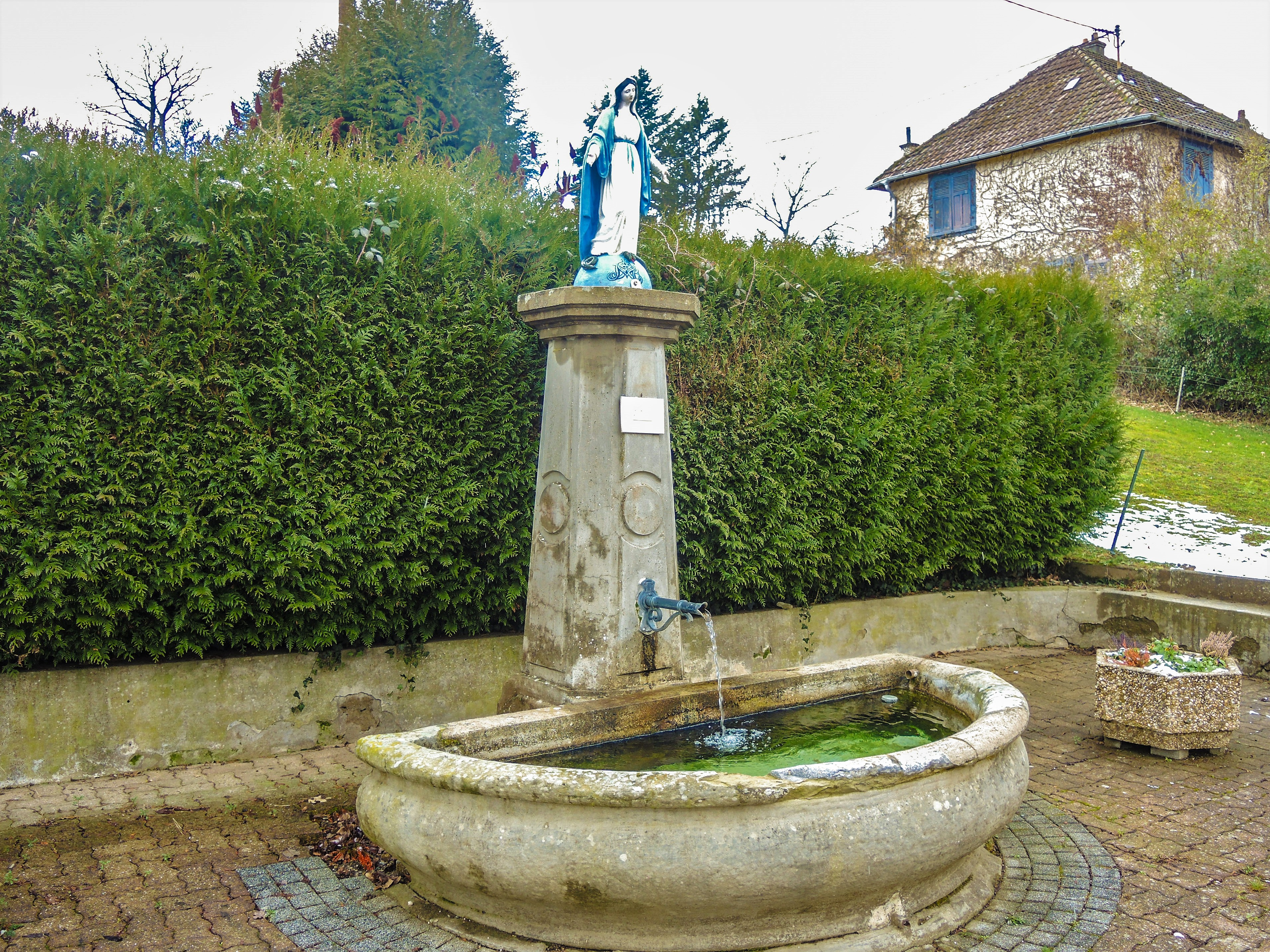 Fontaine de la vierge à Mortzwiller. Haut-Soulzbac.Haut-Rhin.